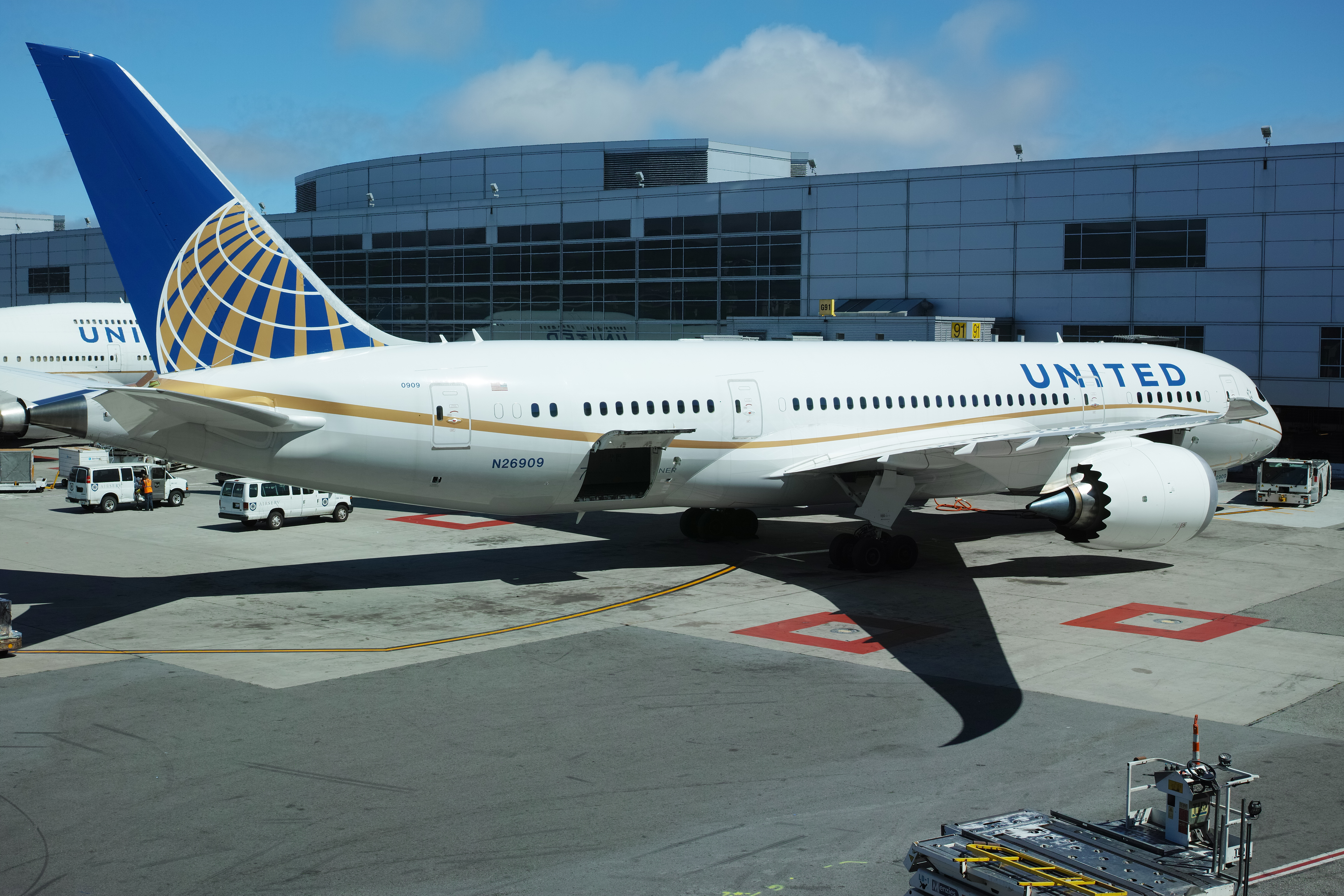 SIGMA dp2 Quattro